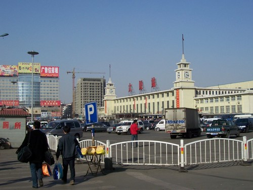 太原火车站